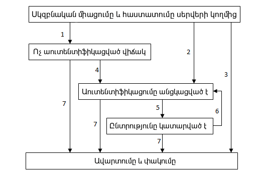 IMAP սերվիսի/սերվերի աշխատանքի ընթացքը, հաջորդական քայլերը.